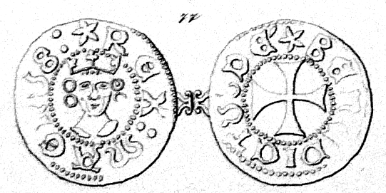 Pfennig-Münze des norwegischen Königs Magnus Lagabætir (König 1263—1280). Text: Adv: + REX MAGNUS. Rev: + BENEDICTUS DE(us). 1,084 g. Feingehalt 250 ‰.